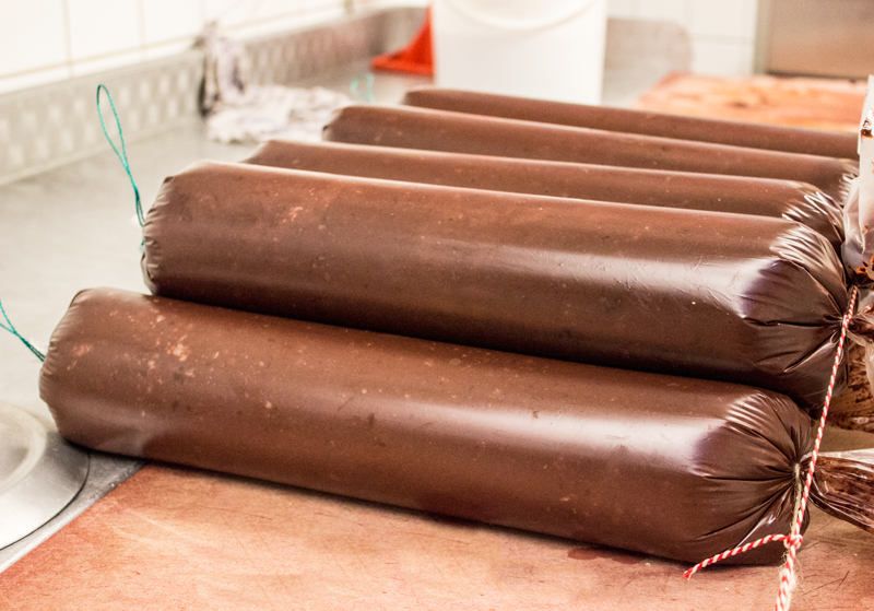 Groningse bloedworst met stroop en rozijnen